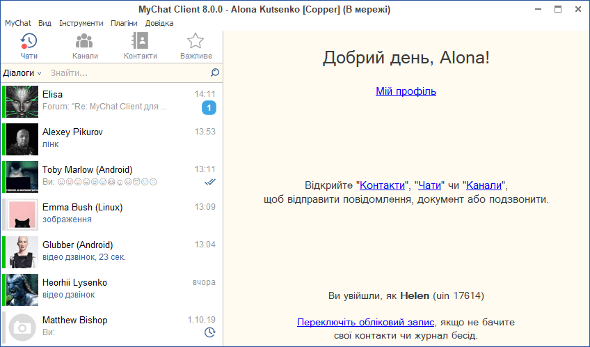 Як виглядає MyChat 8 для Windows